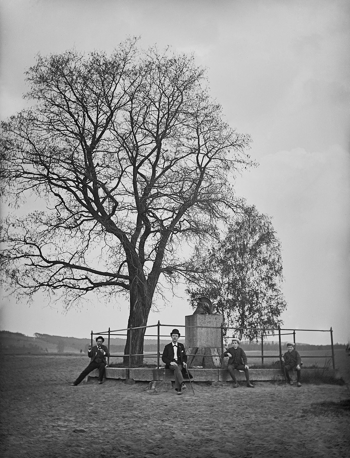 Denkmal für Hauptmann Hirsch mit sitzenden Herren und Kindern auf dem Sockel der Einfriedung, daneben eine Robinie und Birken